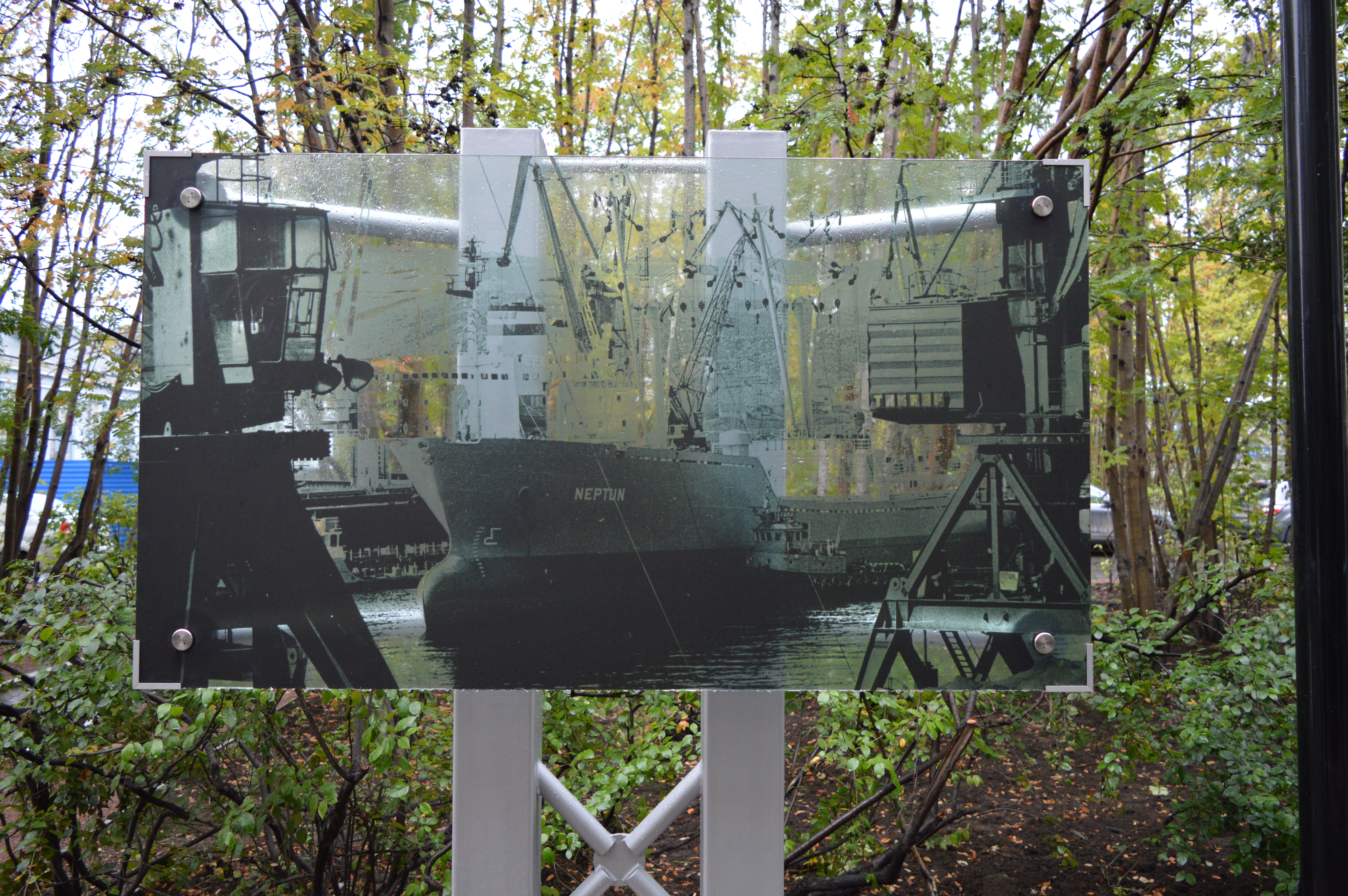 Фрагмент музея под открытым небом